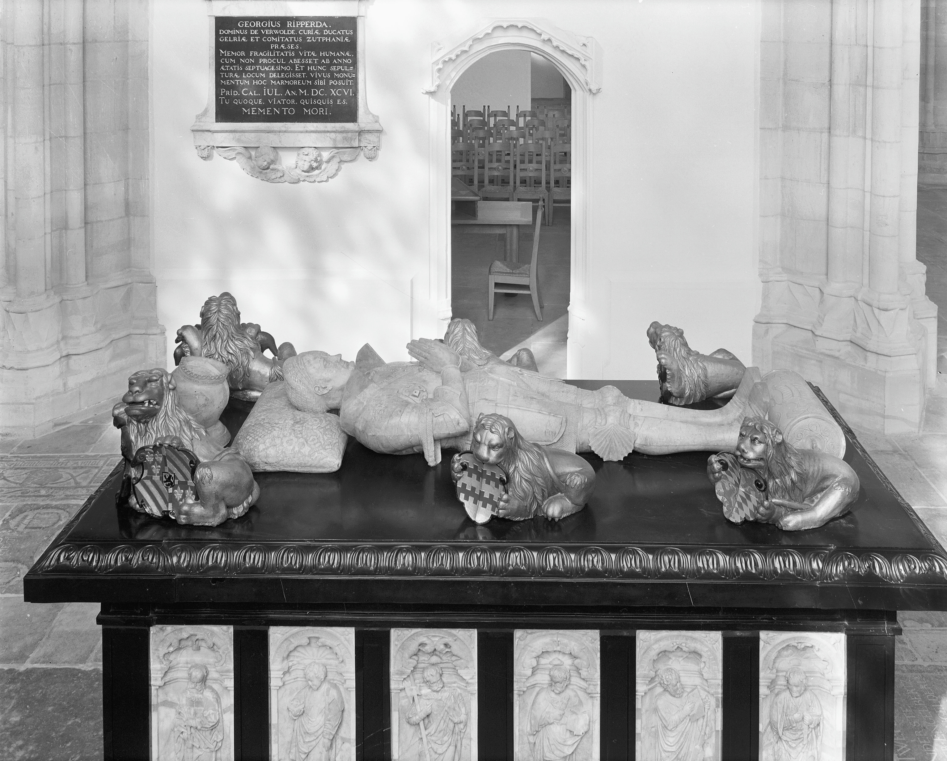 Eusebius- of Grote Kerk (Nederlands Hervormd): graf Karel van Gelre